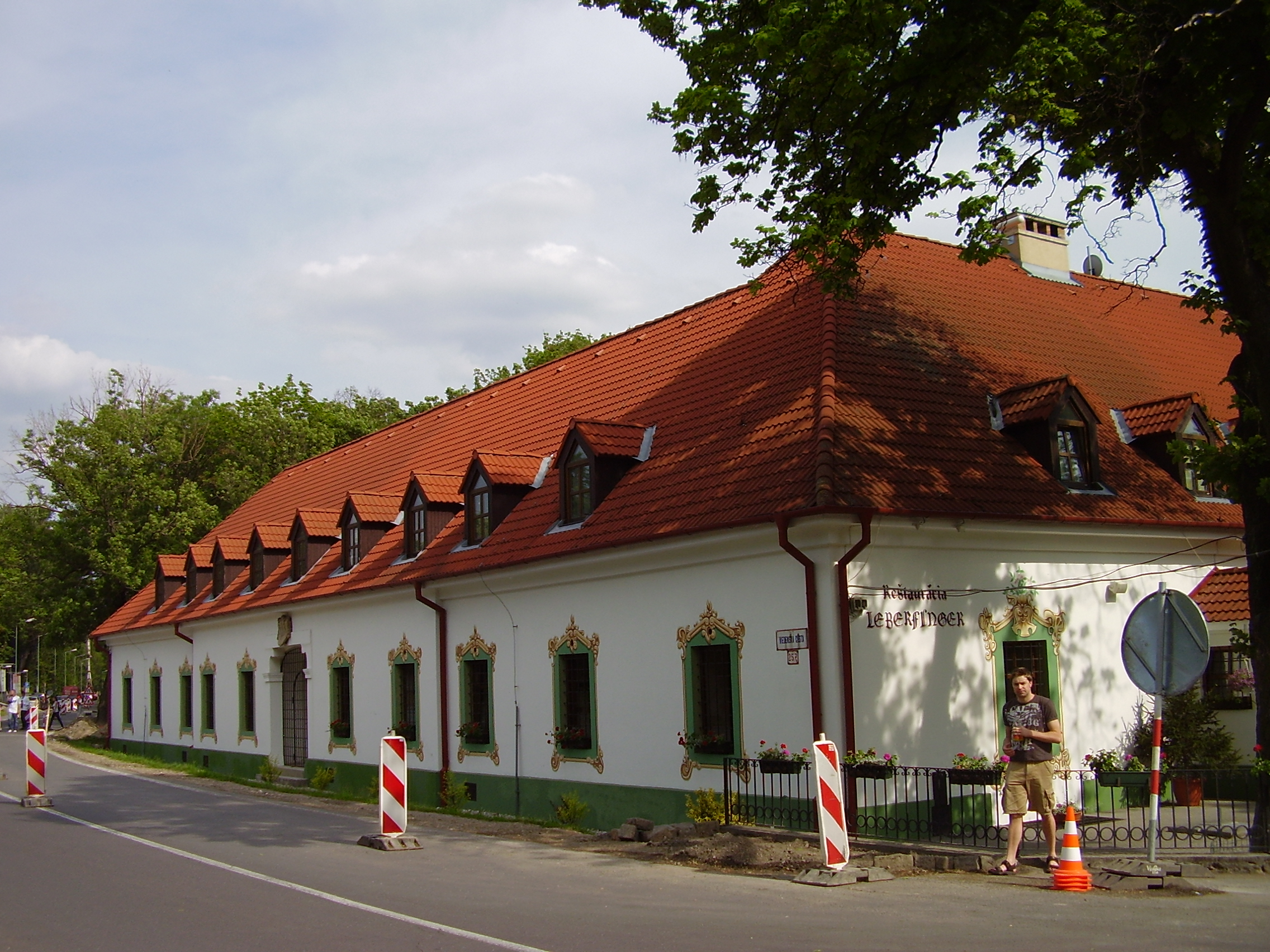 Leberfinger restaurant, Petržalka, Viedenská cesta